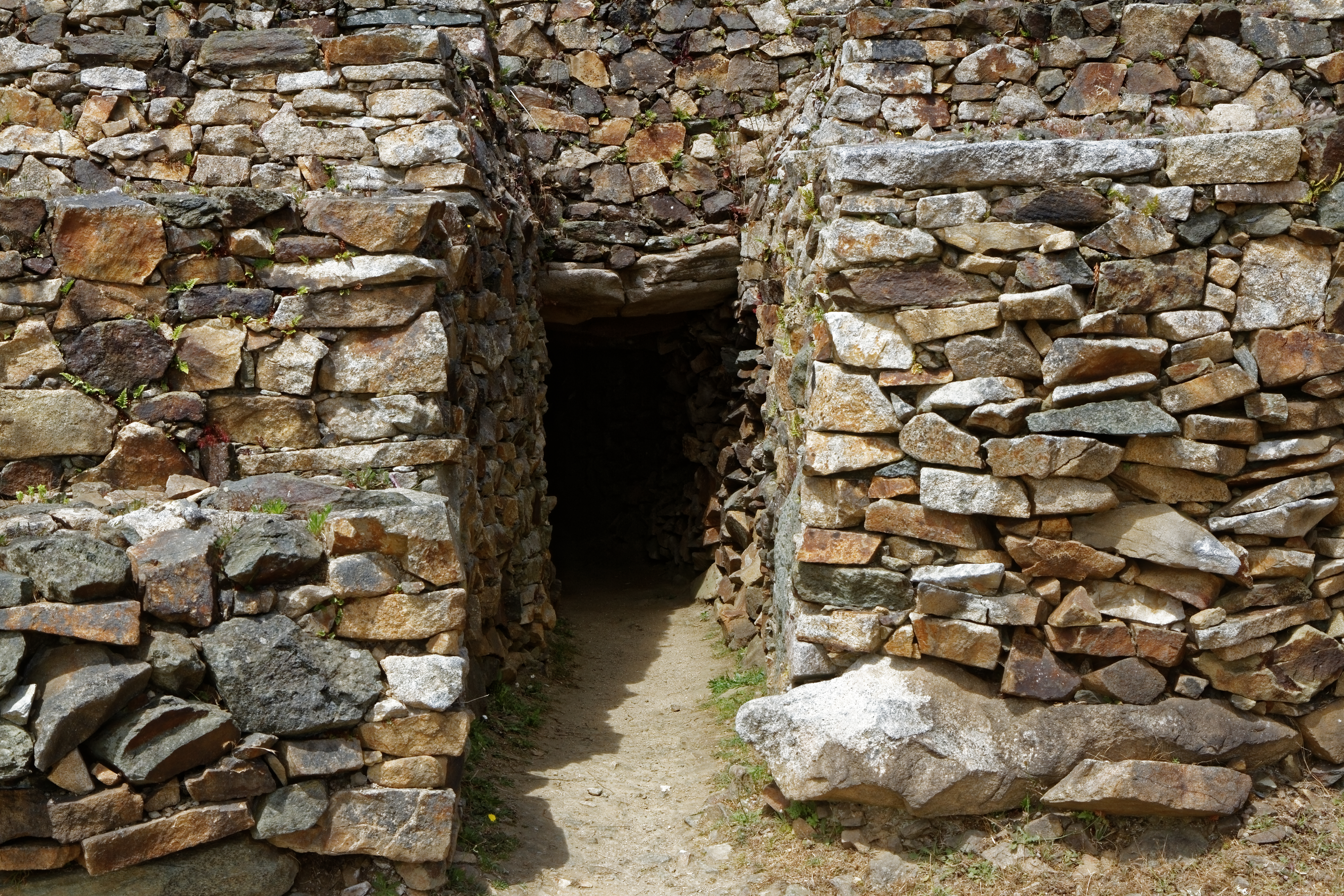 Panorama du Cairn de Barnenez à Plouezoc'h dans le Finistère. .